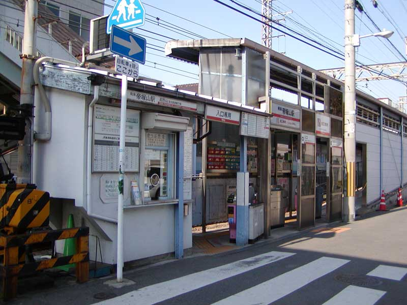 南海高野線帝塚山駅・高野山方面行き改札口。2007年1月 投稿者が撮影。